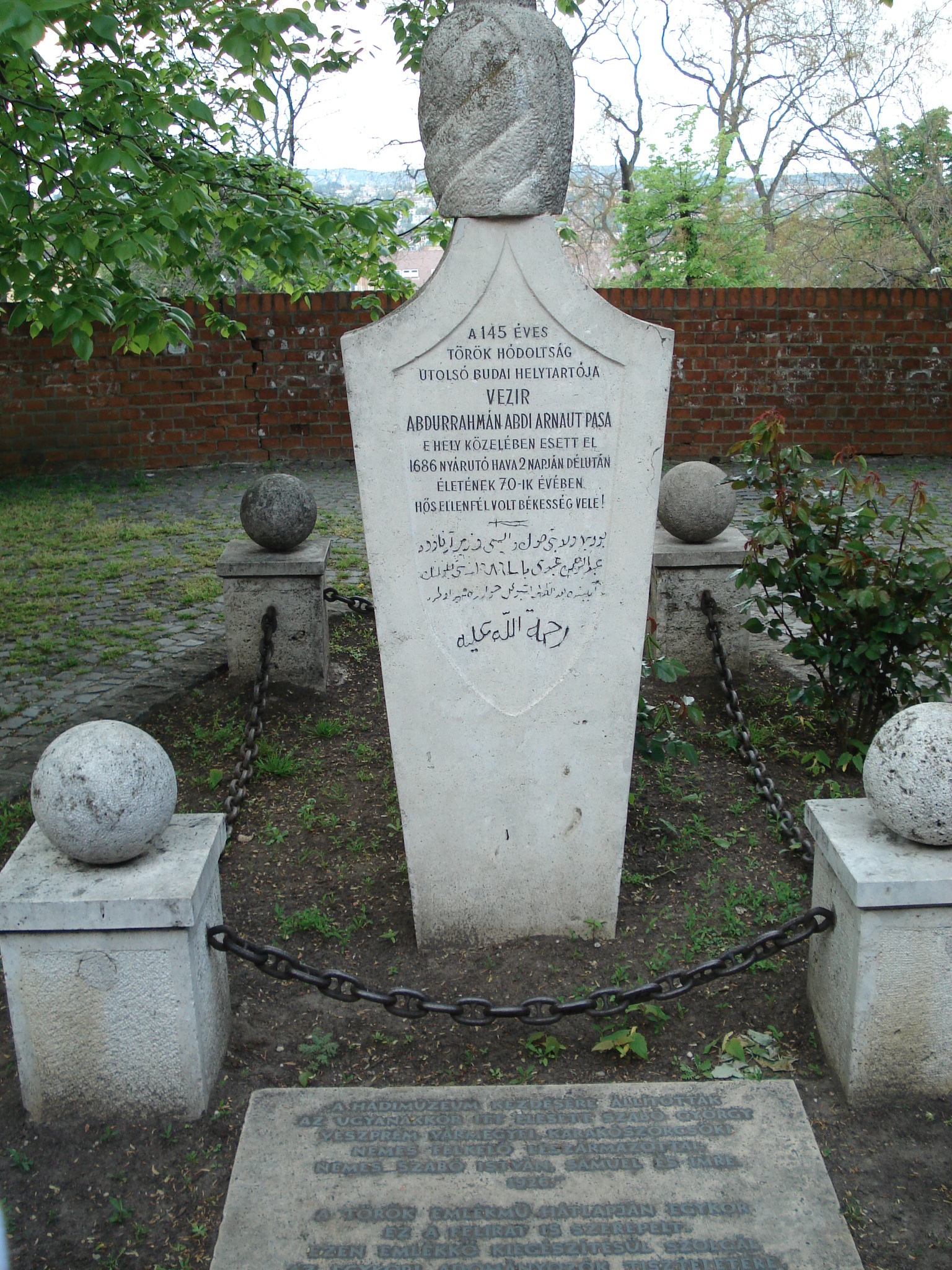 Abdurrahman (utolsó budai) pasa állítólagos halálának a helye 1686-ban